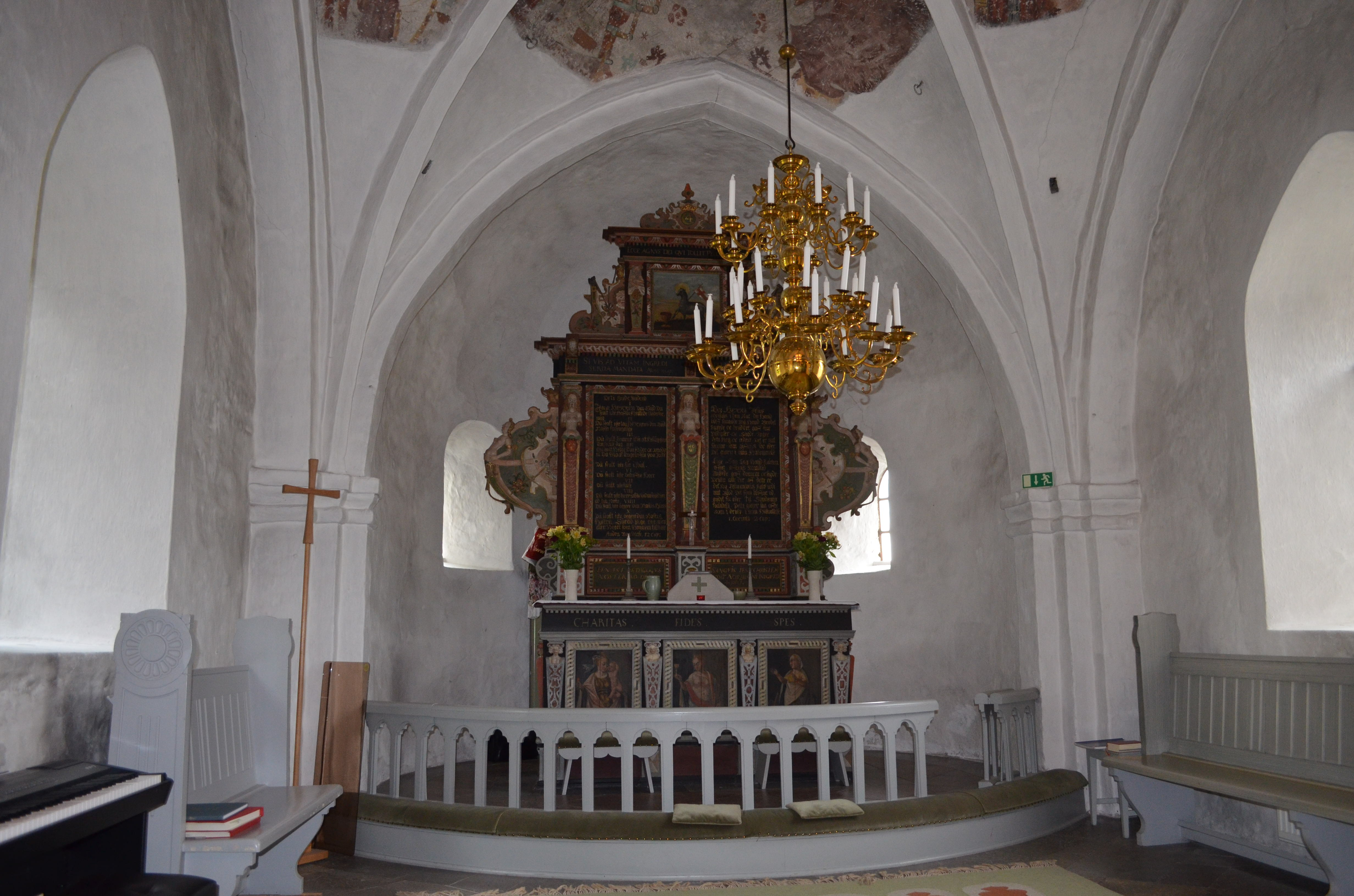 Altaret.